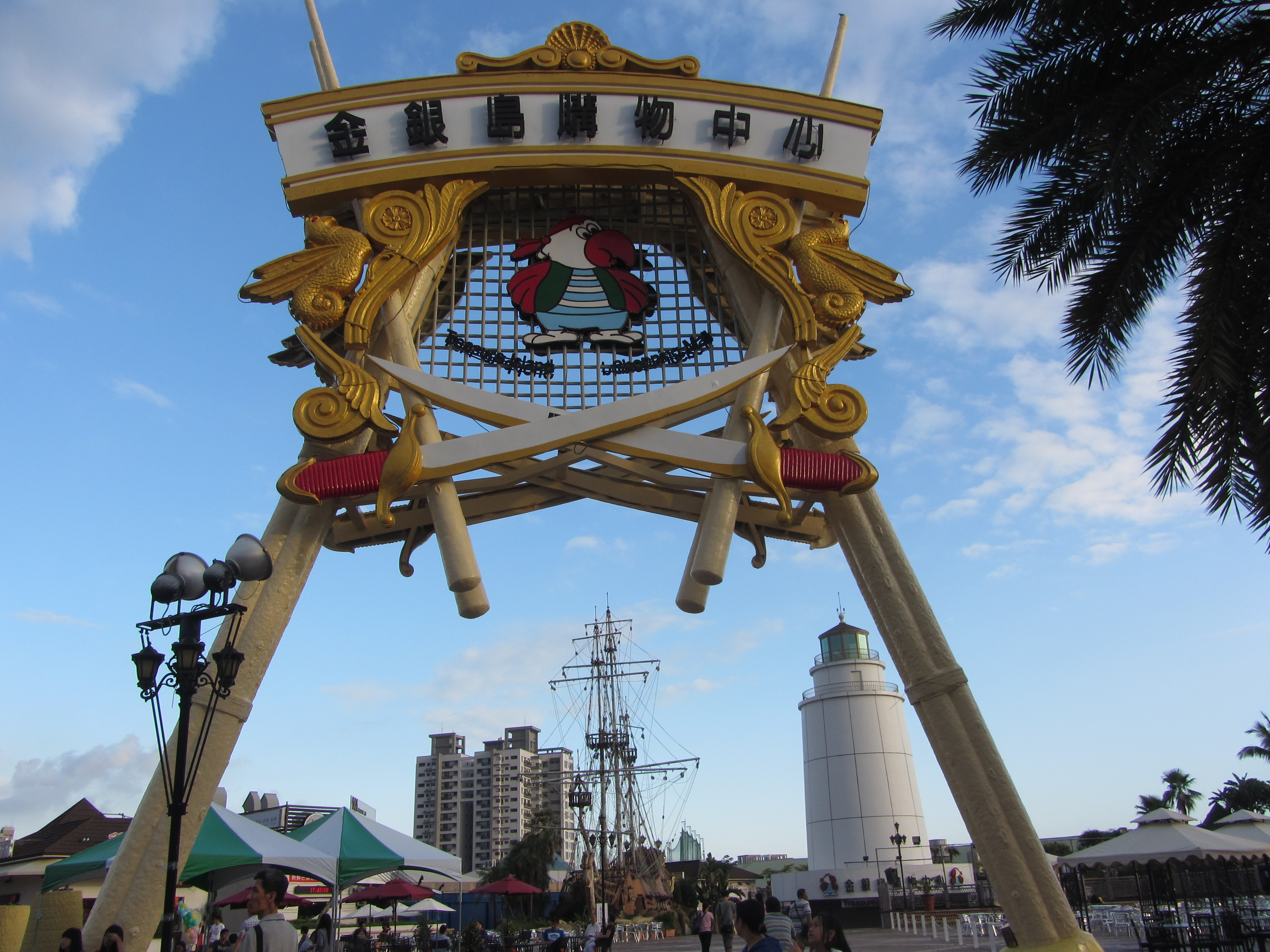 高雄市金銀島購物中心入口